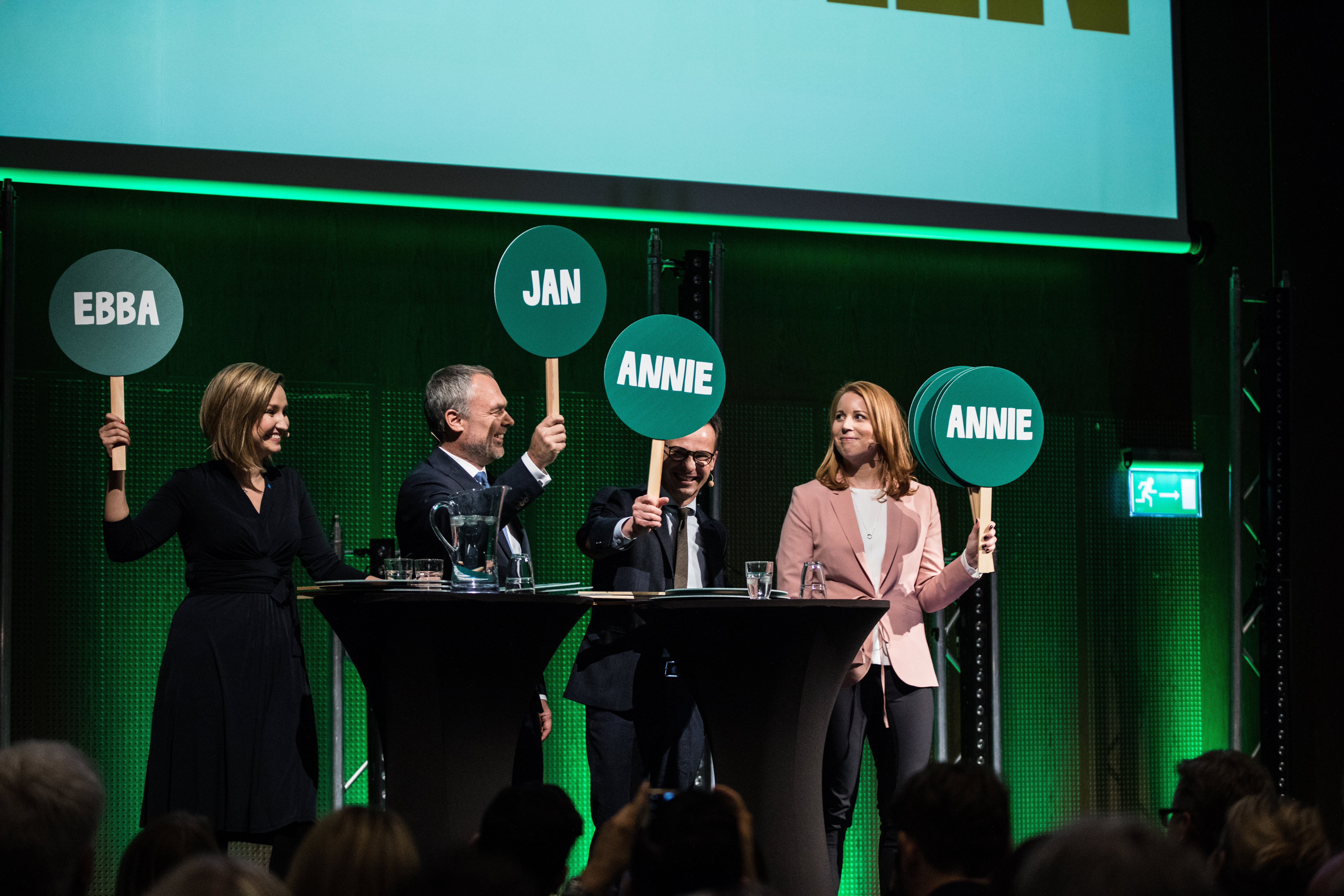 Centerpartiets kommundagar 2018